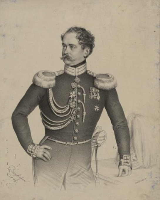 Николай Александрович Огарёв (1811—1867)